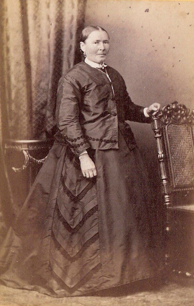 CDV einer Dame